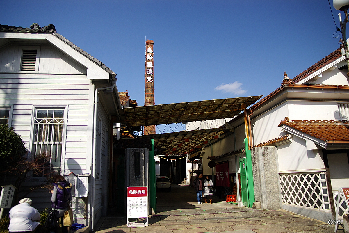 広島県東広島市の亀齢酒造